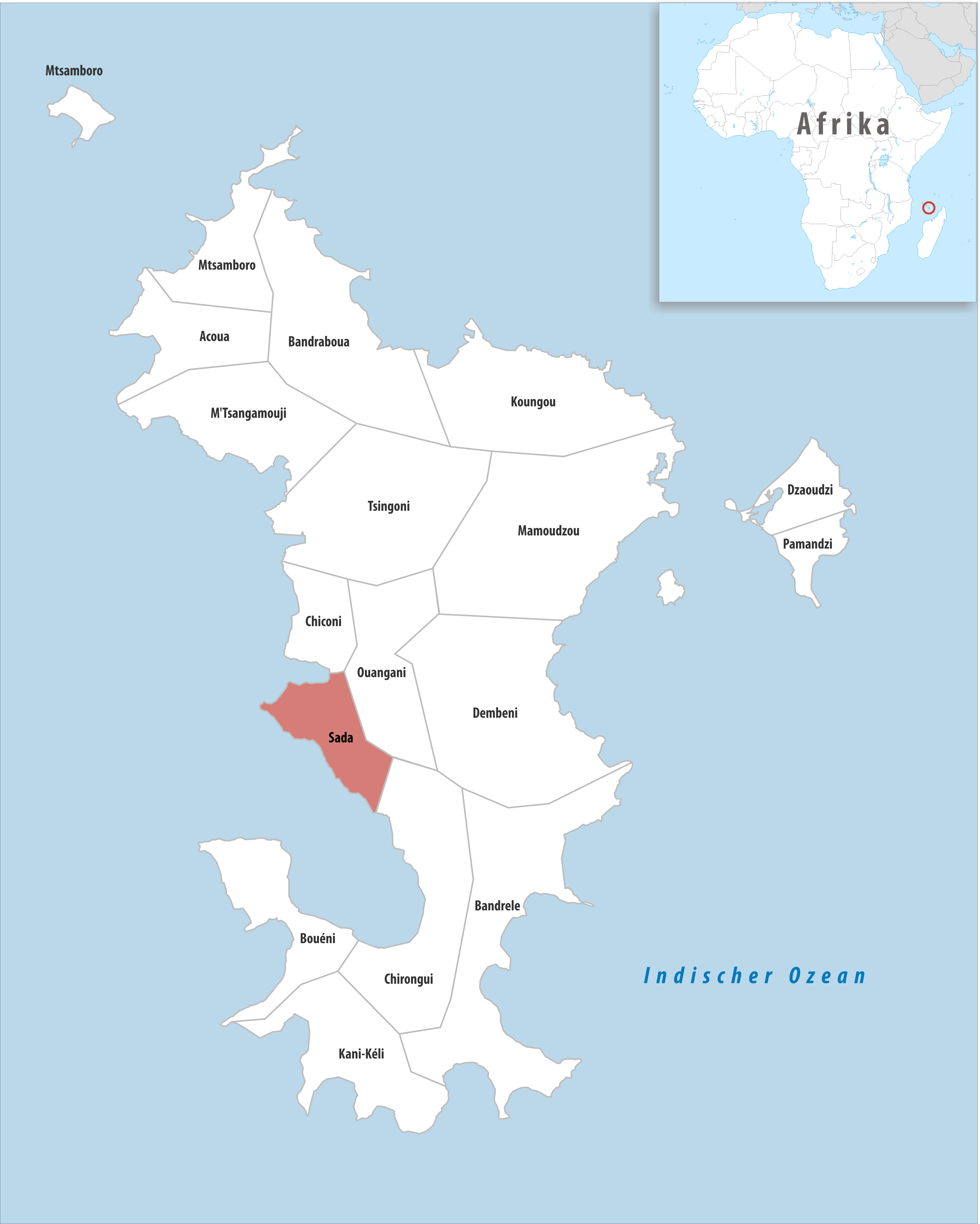 Lage der Gemeinde Sada